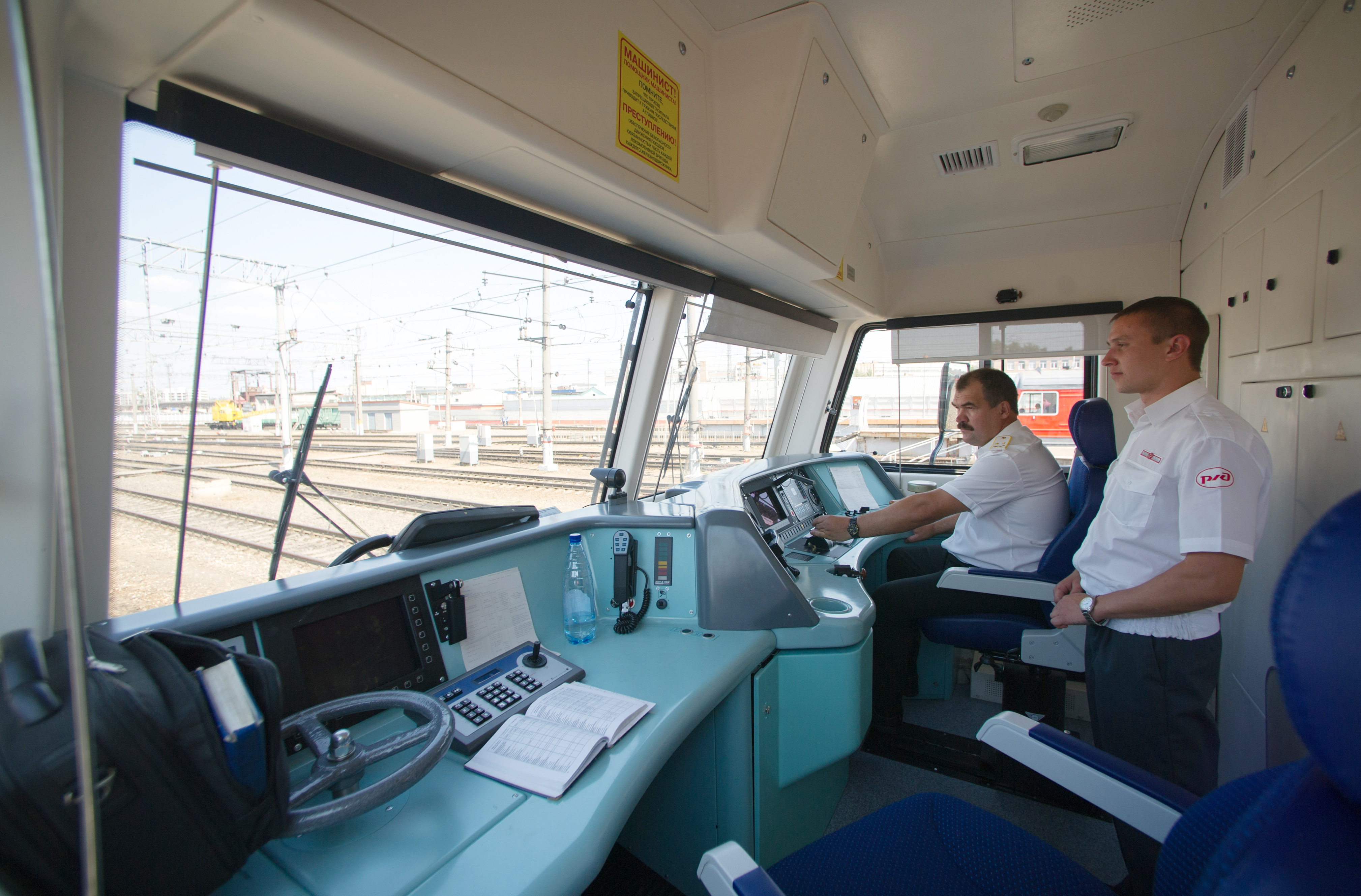 Интерьер кабины машиниста электропоезда ЭД4М-0458